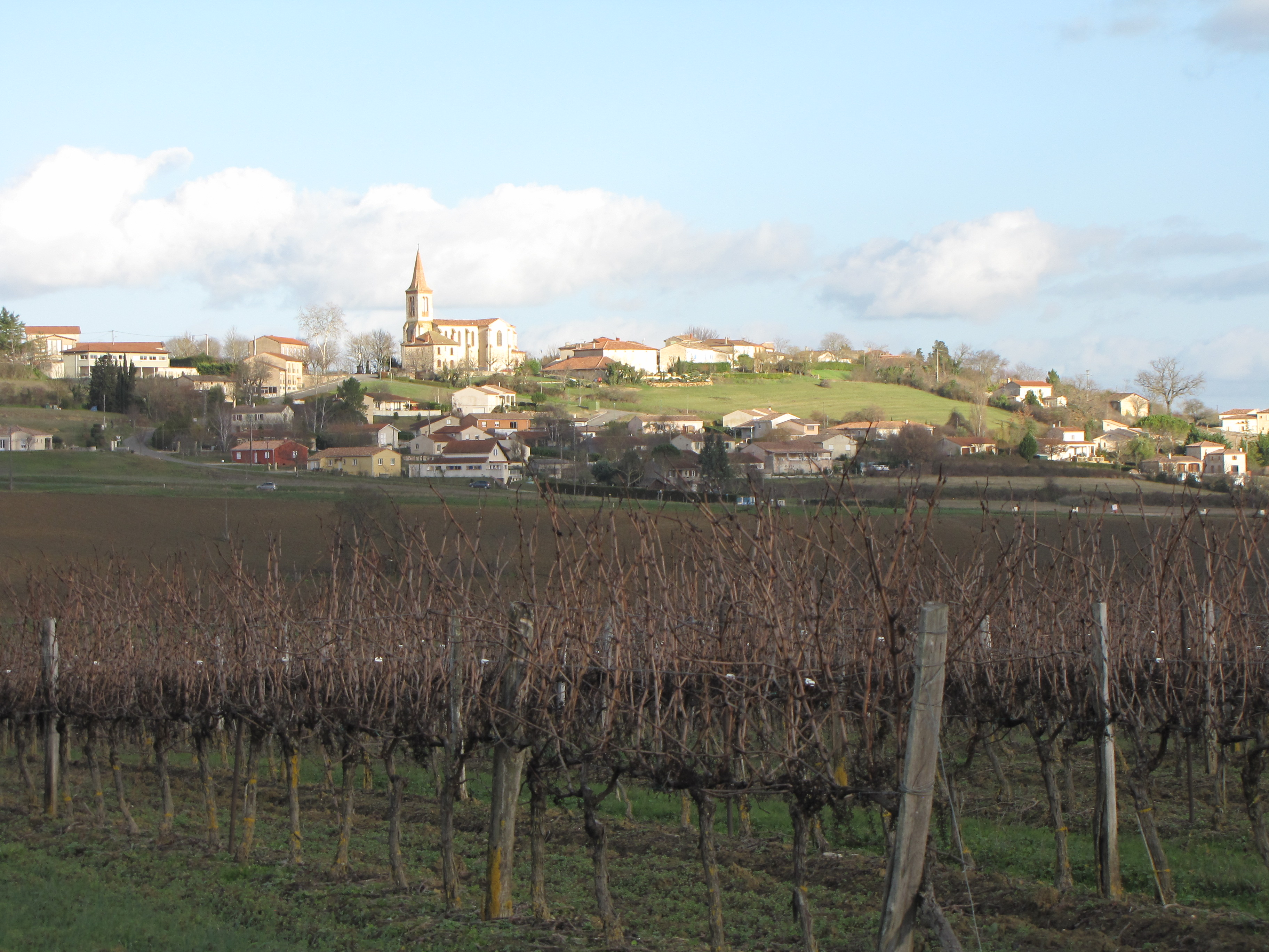 Senouillac